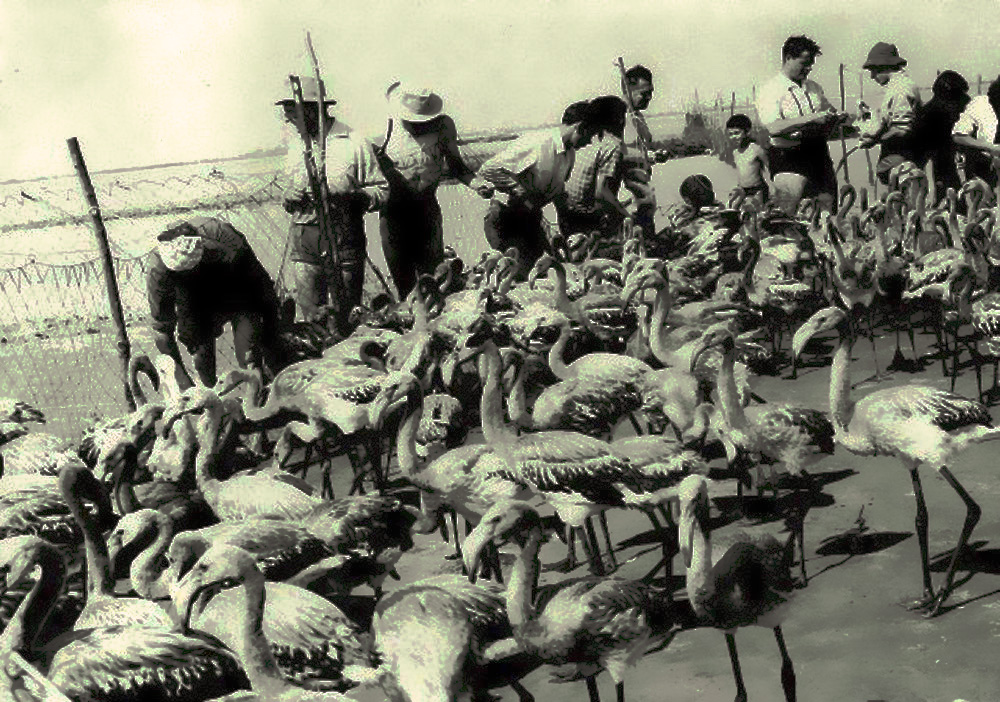 Comptage de flamants dans les années 1930